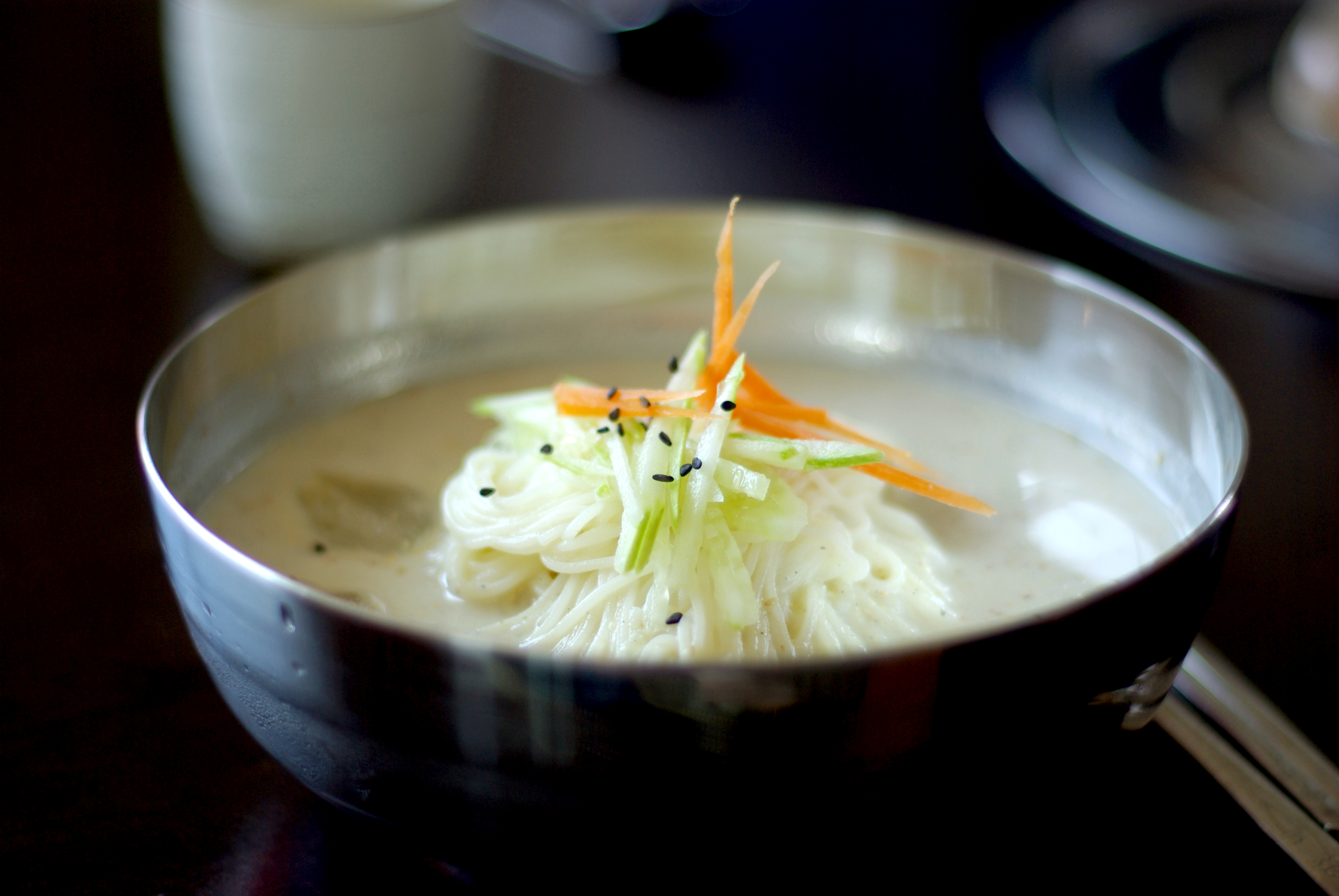 금산의 어느 음식점에서..